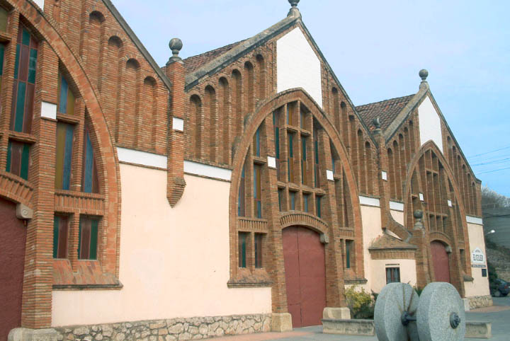 Celler cooperatiu de l'Espluga de Francolí